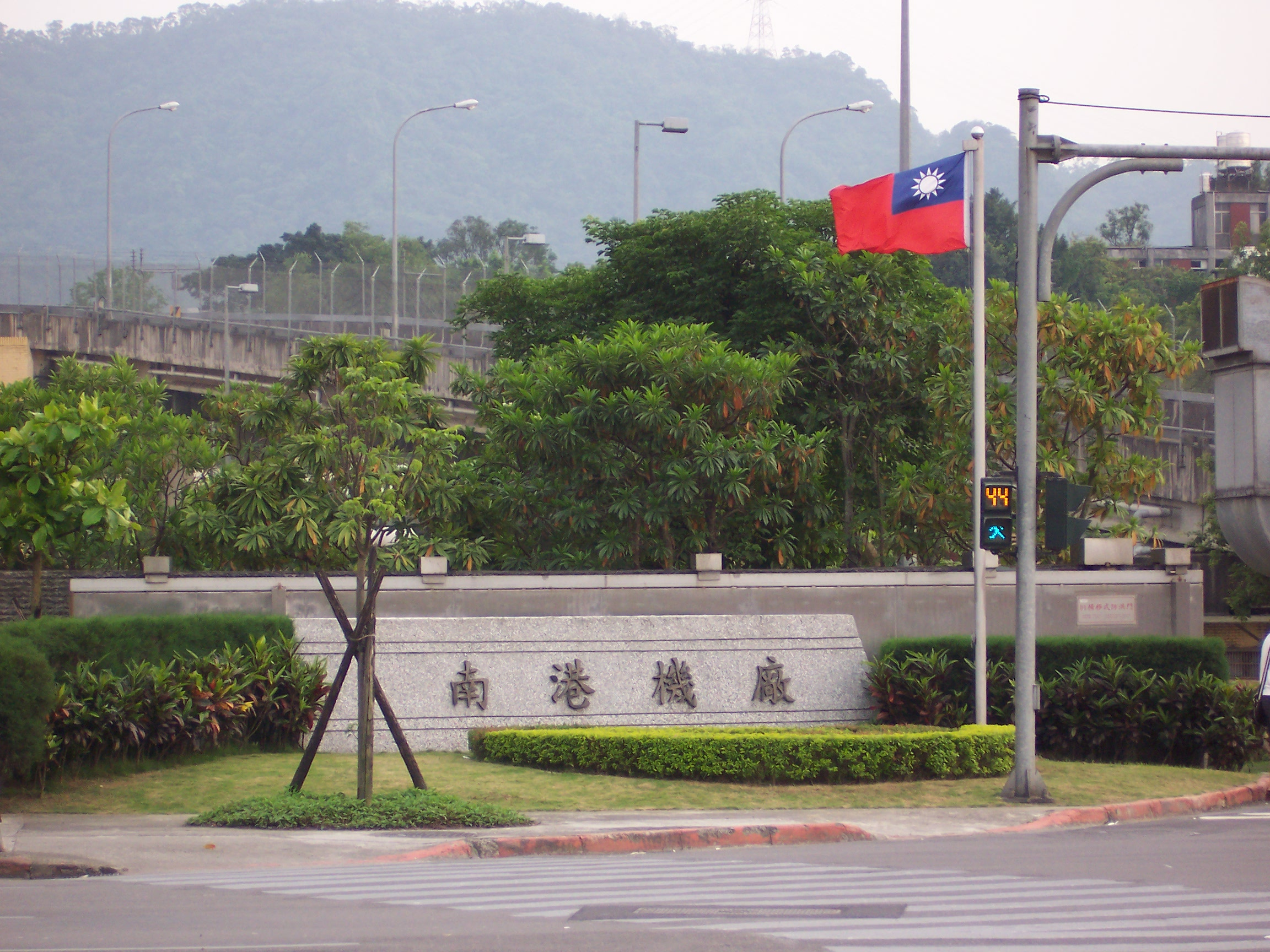 南港機廠。 Nangang Depot. (Former spelling: Nankang Depot)